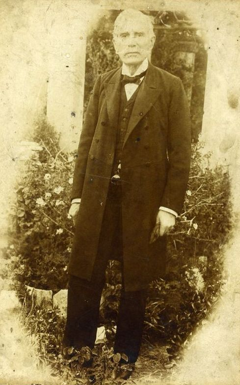 onsole generale onorario di Grecia a Napoli dal 1877 al 1910.